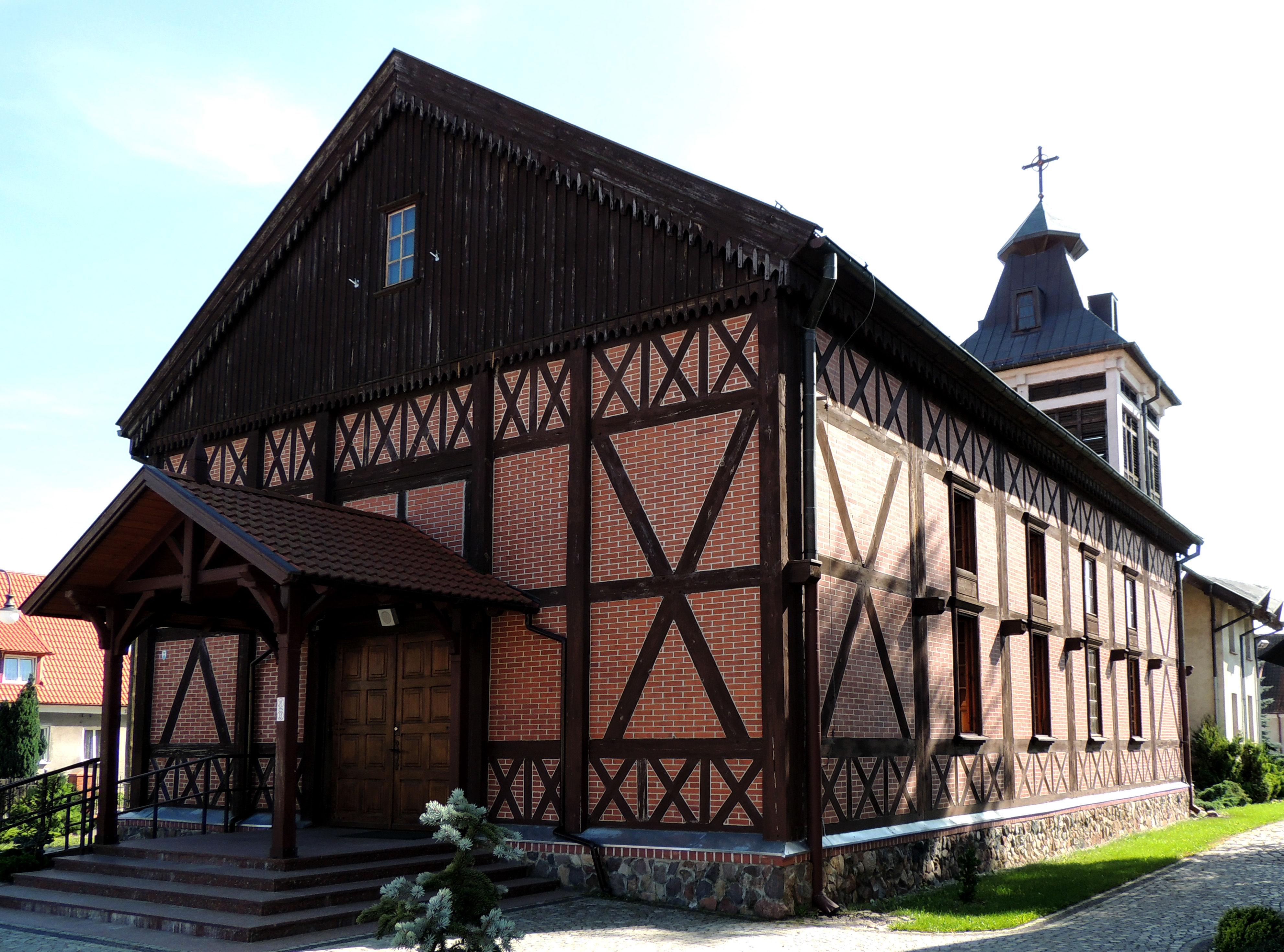 Elbląg, kościół ewangelicki, ob. rzym.-kat. p.w. Trójcy Św., 1838, 1993